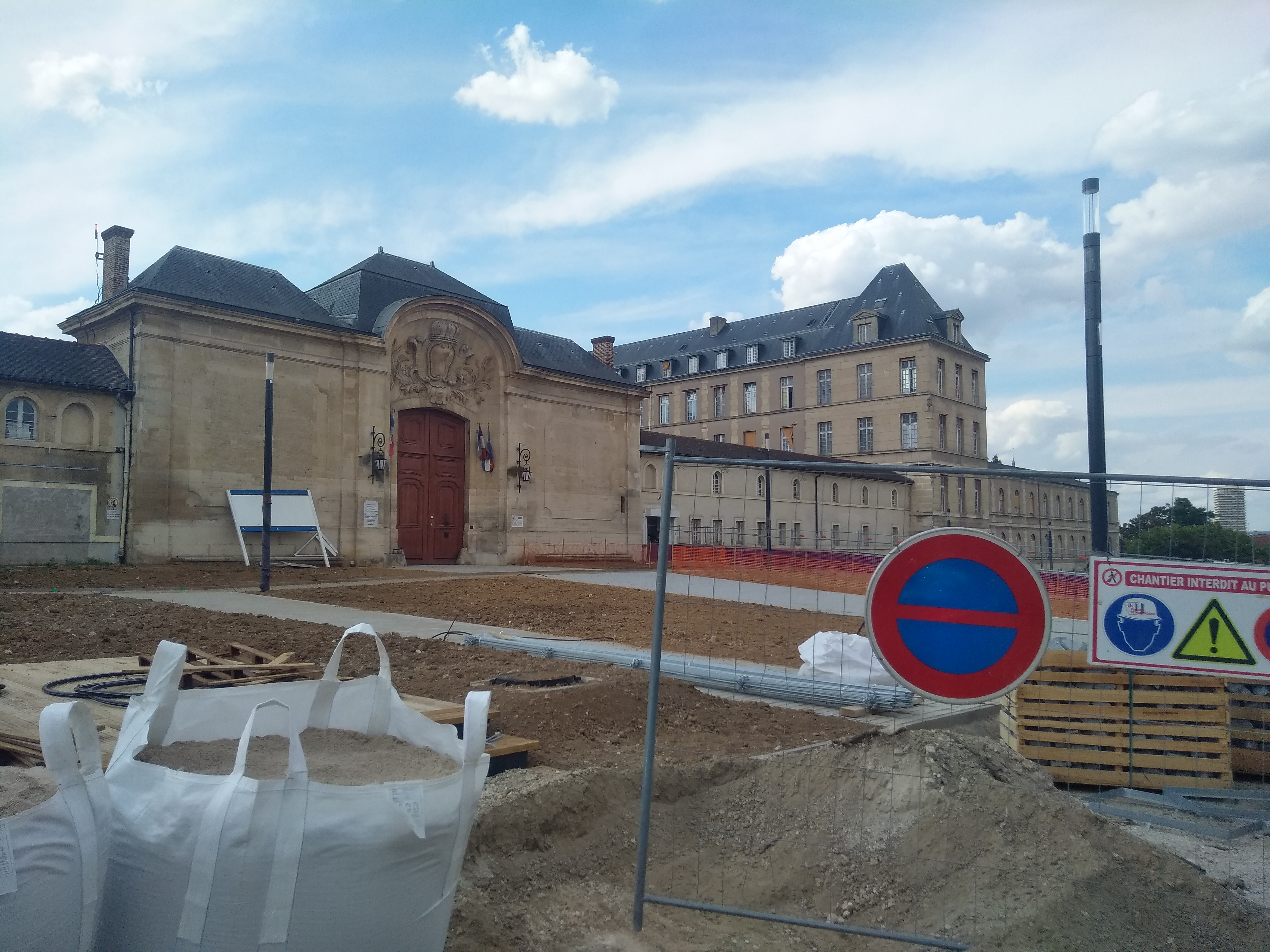 Kremlin-Bicêtre - travaux devant l'hôpital de Bicêtre